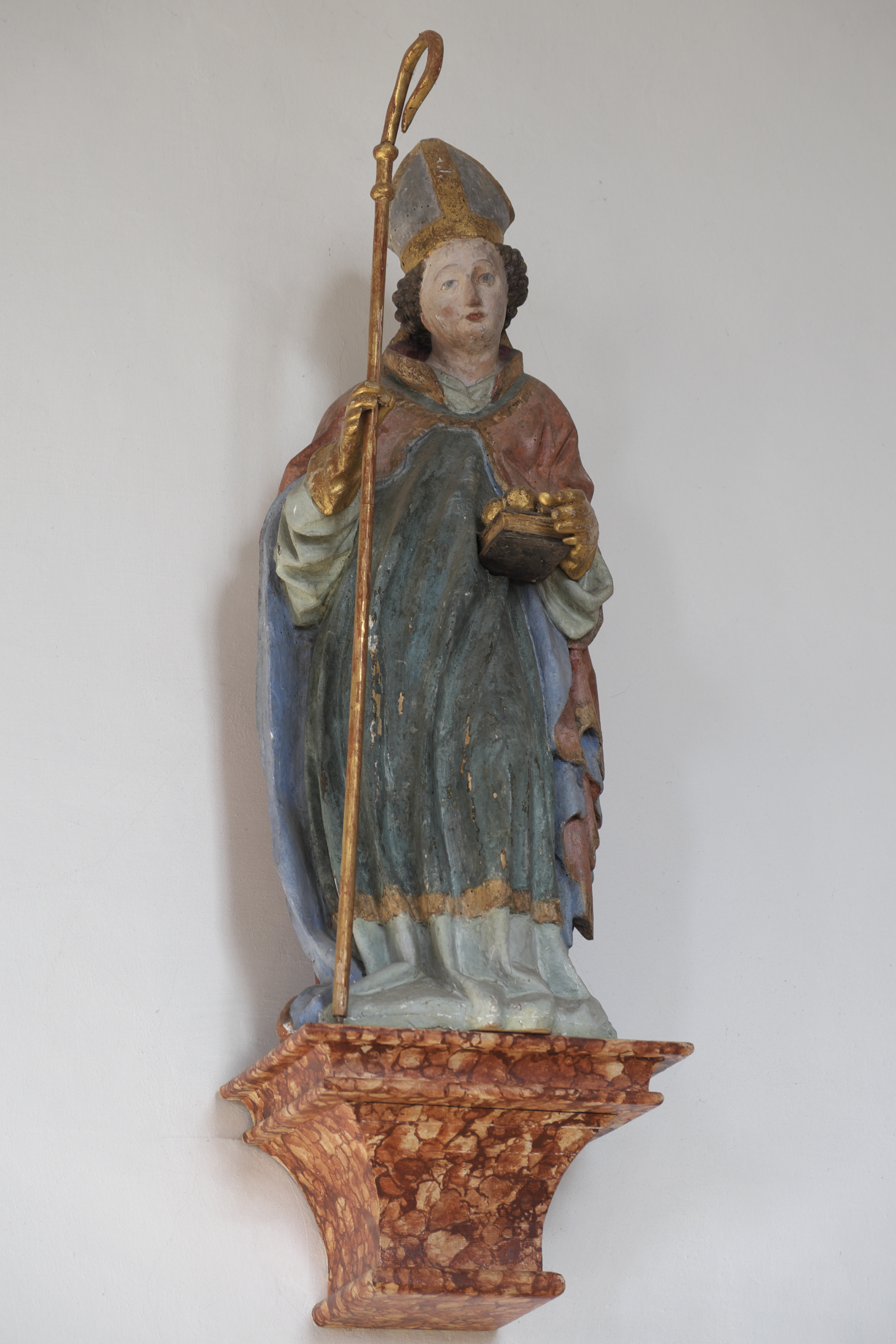 Alte katholische Pfarrkirche St. Johannes der Täufer in Breitbrunn am Ammersee (Herrsching am Ammersee) im Landkreis Starnberg (Bayern/Deutschland), Figur des heiligen Nikolaus, um 1440